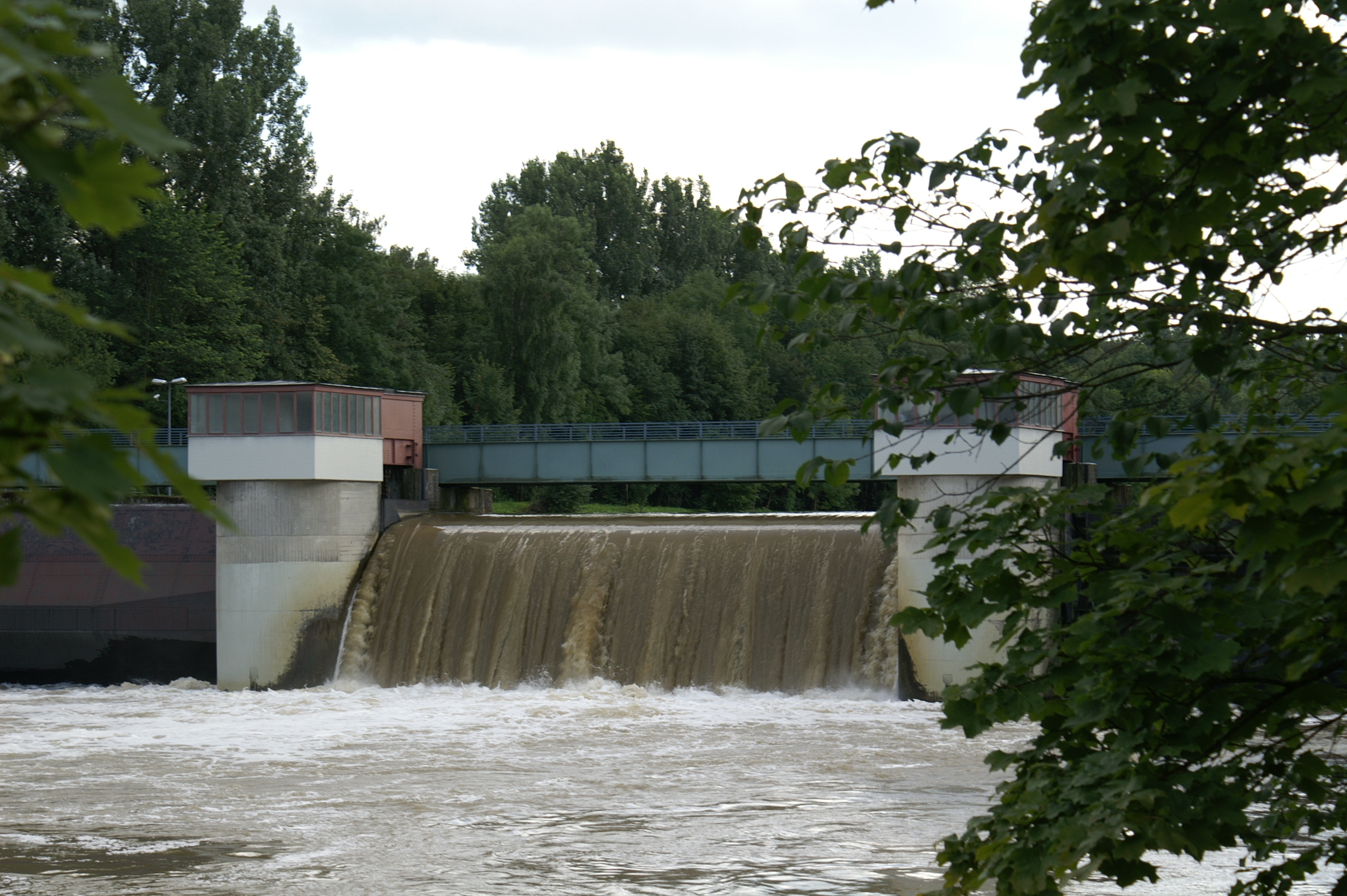 Das Wasserkraftwerk Böfinger Halde nordöstlich von Ulm ist das größte Donaukraftwerk in Baden-Württemberg